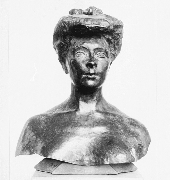 Busto bronzeo di Nathalie de Goloubeff, realizzato da Auguste Rodin nel 1906. È custodito presso il Musée National Auguste Rodin di Parigi. Katalog-Nr. 319.